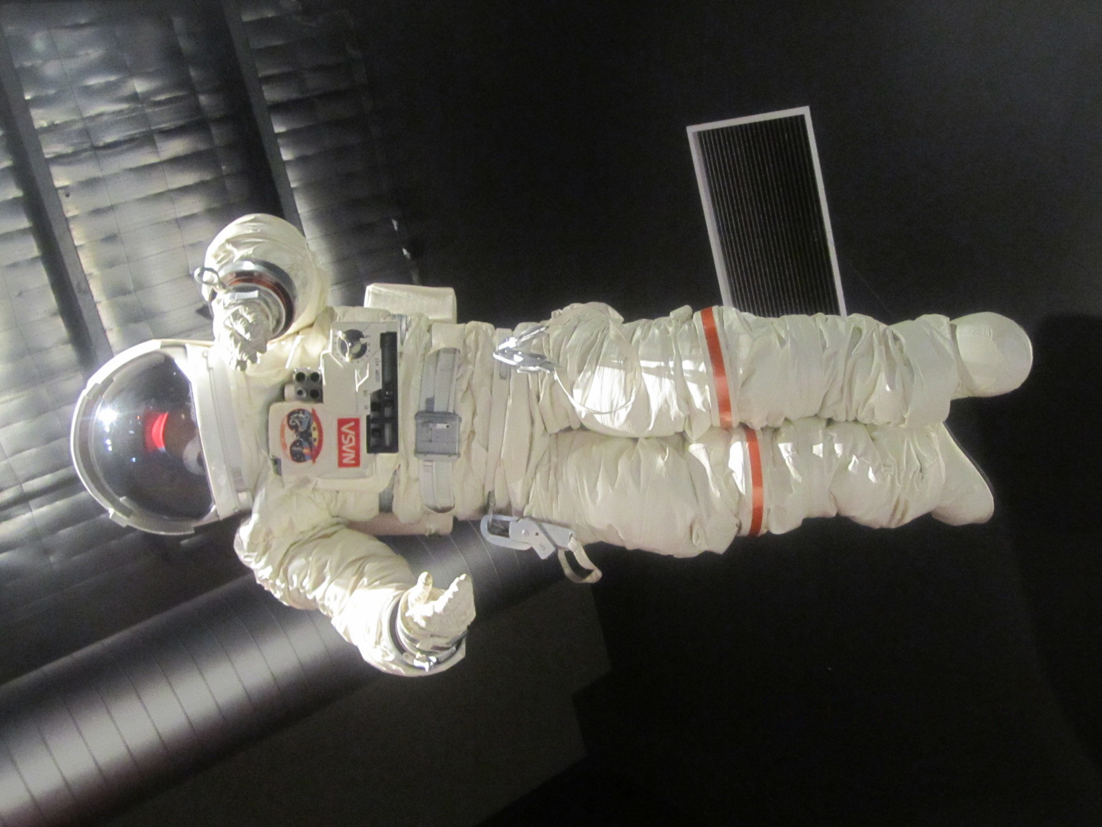 अंतराळ वीरांचा पोशाखाची प्रतिकृती. यात सुमारे ७ स्तर असतात. हे स्तर वीरांचे अवकाशातील धोक्यांपासून संरक्षण करतात.